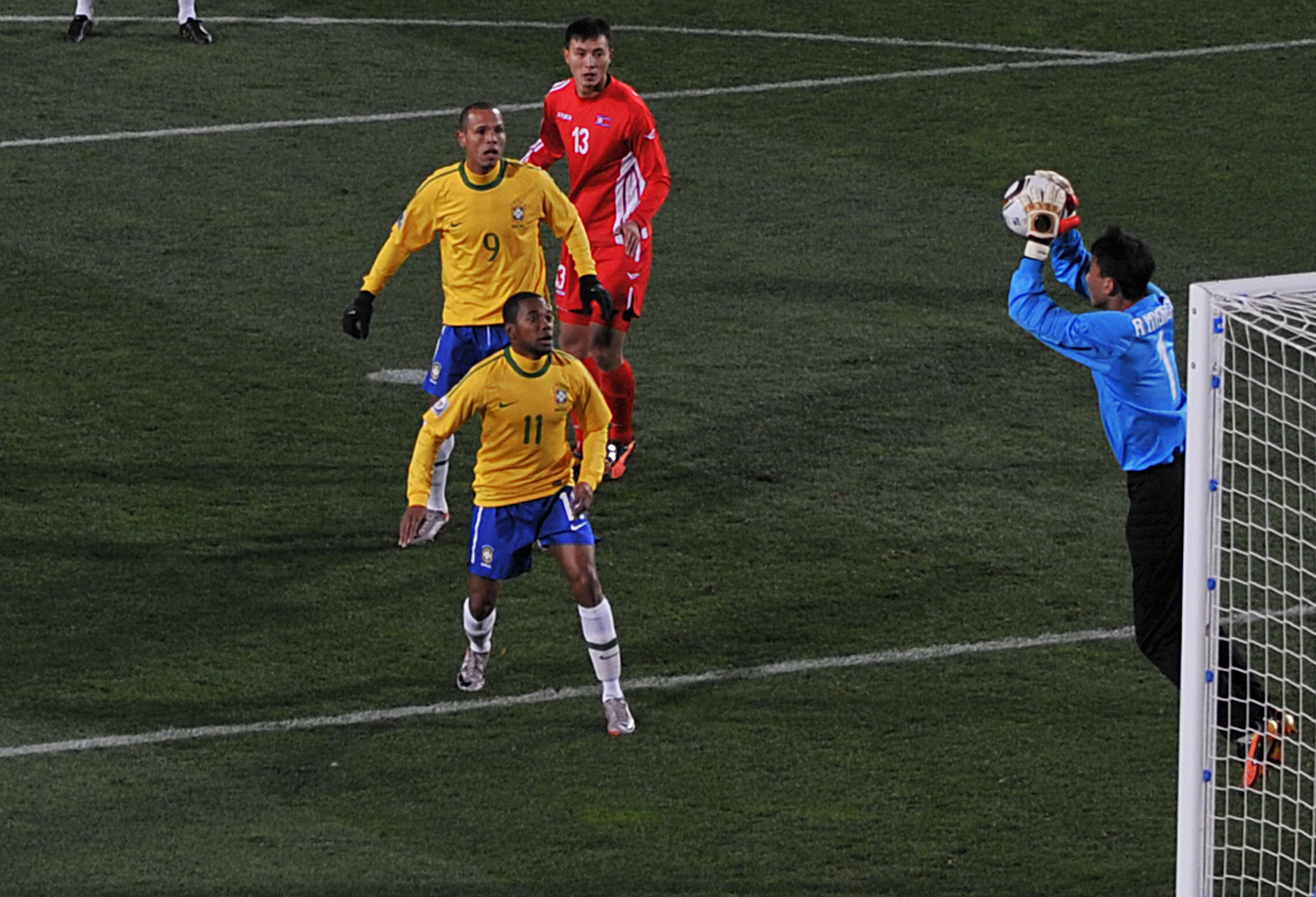 Seleção brasileira estreia na Copa do Mundo de 2010 contra a Coreia do Norte.